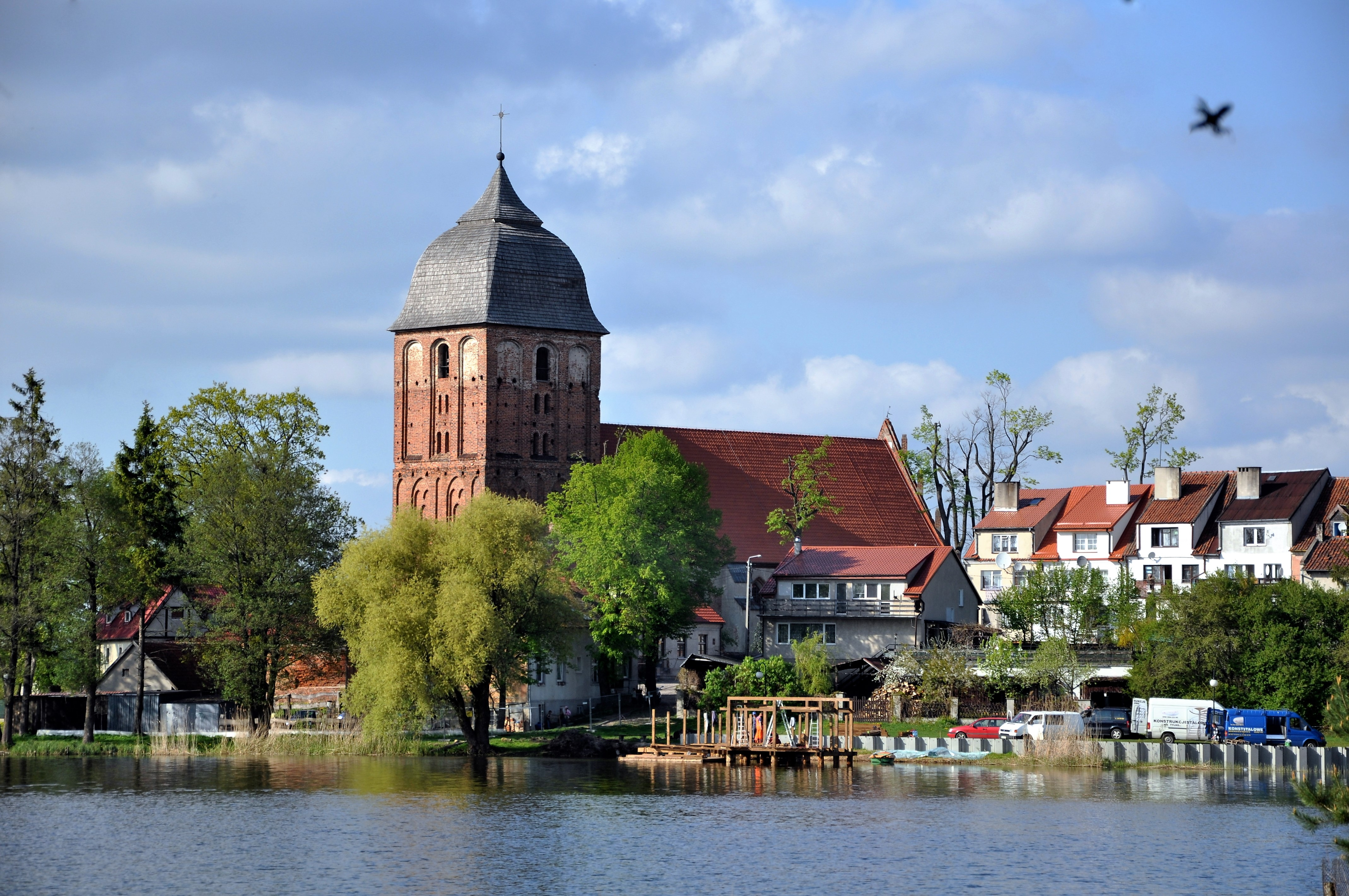 Pasym, kościół ewangelicki, XV/XVI, 1765-1775